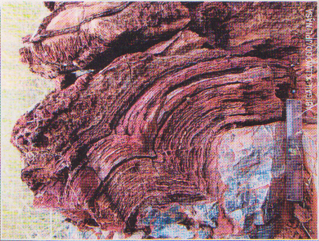 На рисунке строматолит.